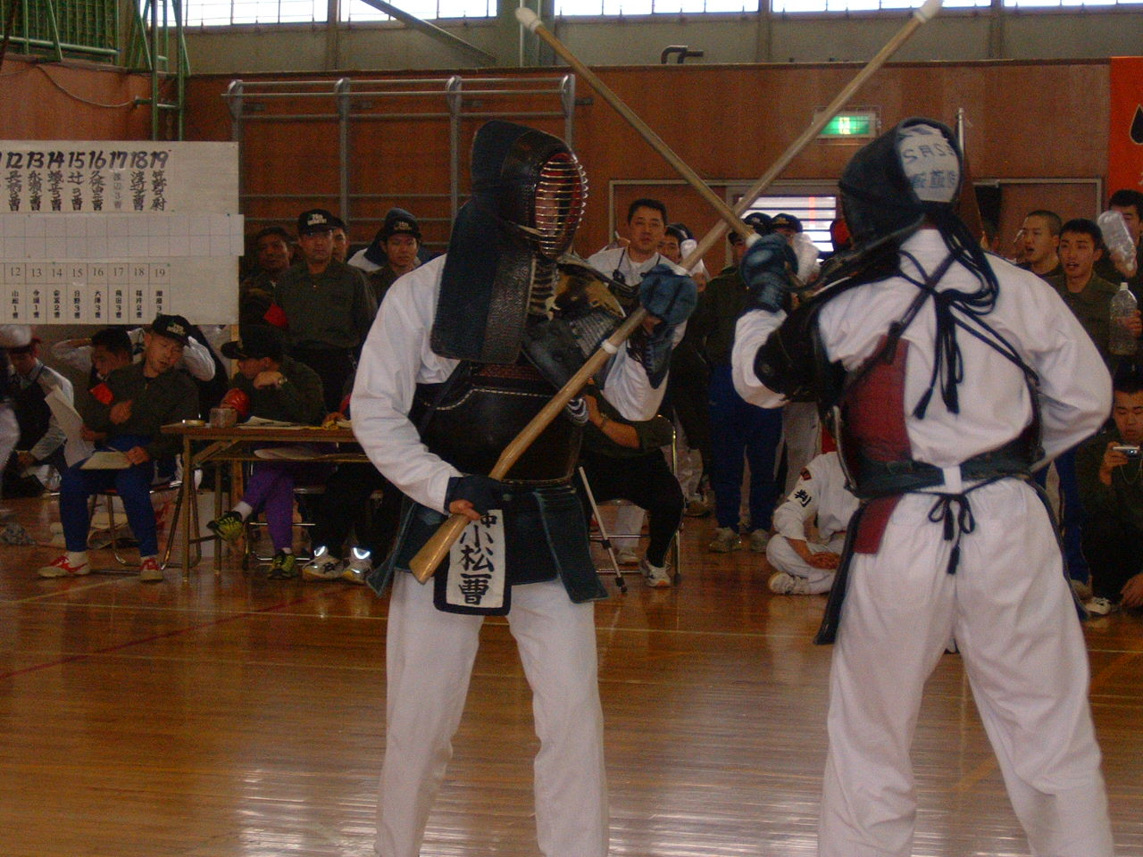 銃剣道大会